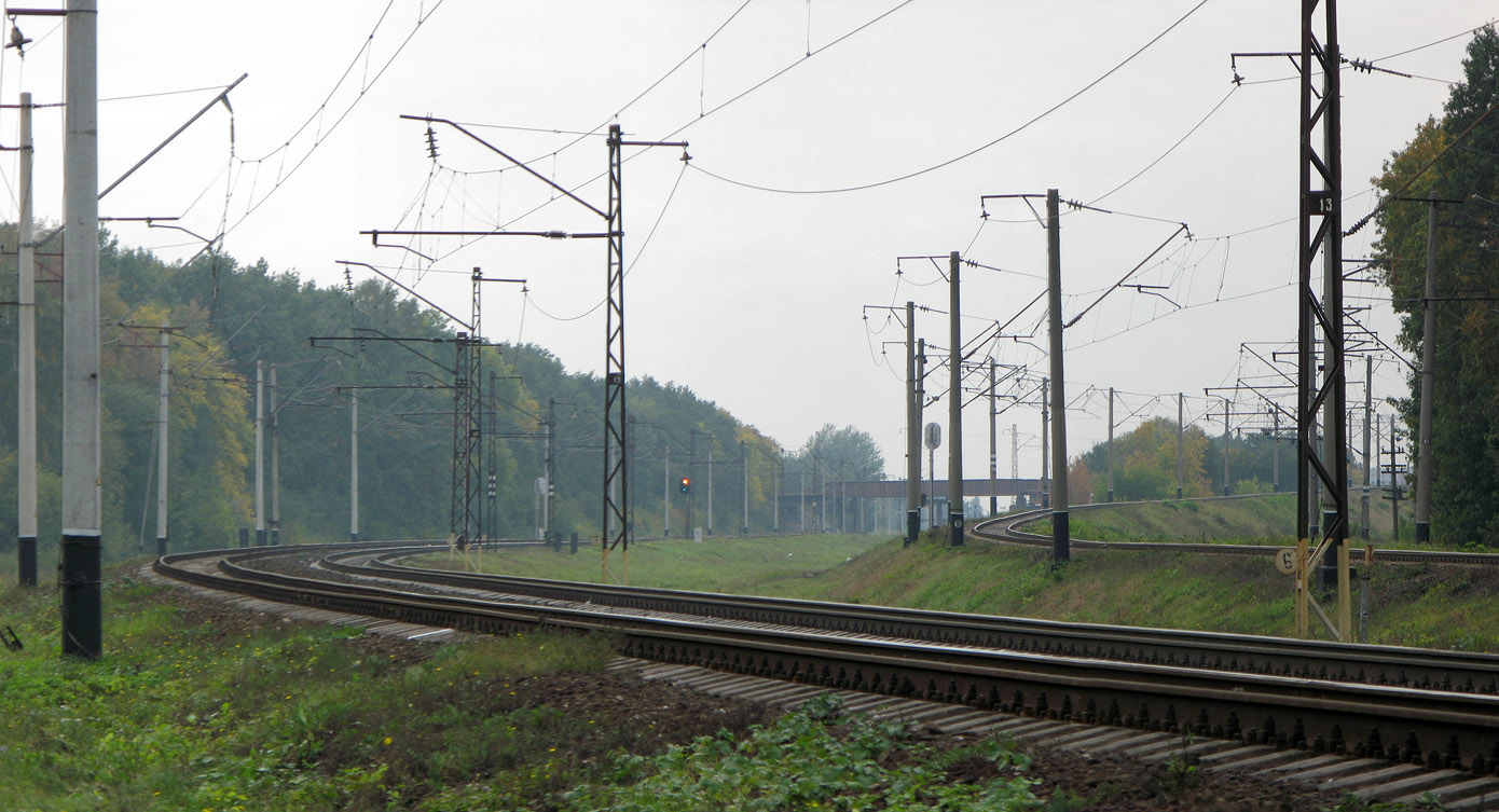 Залізниця біля ст.Київ-Волинський